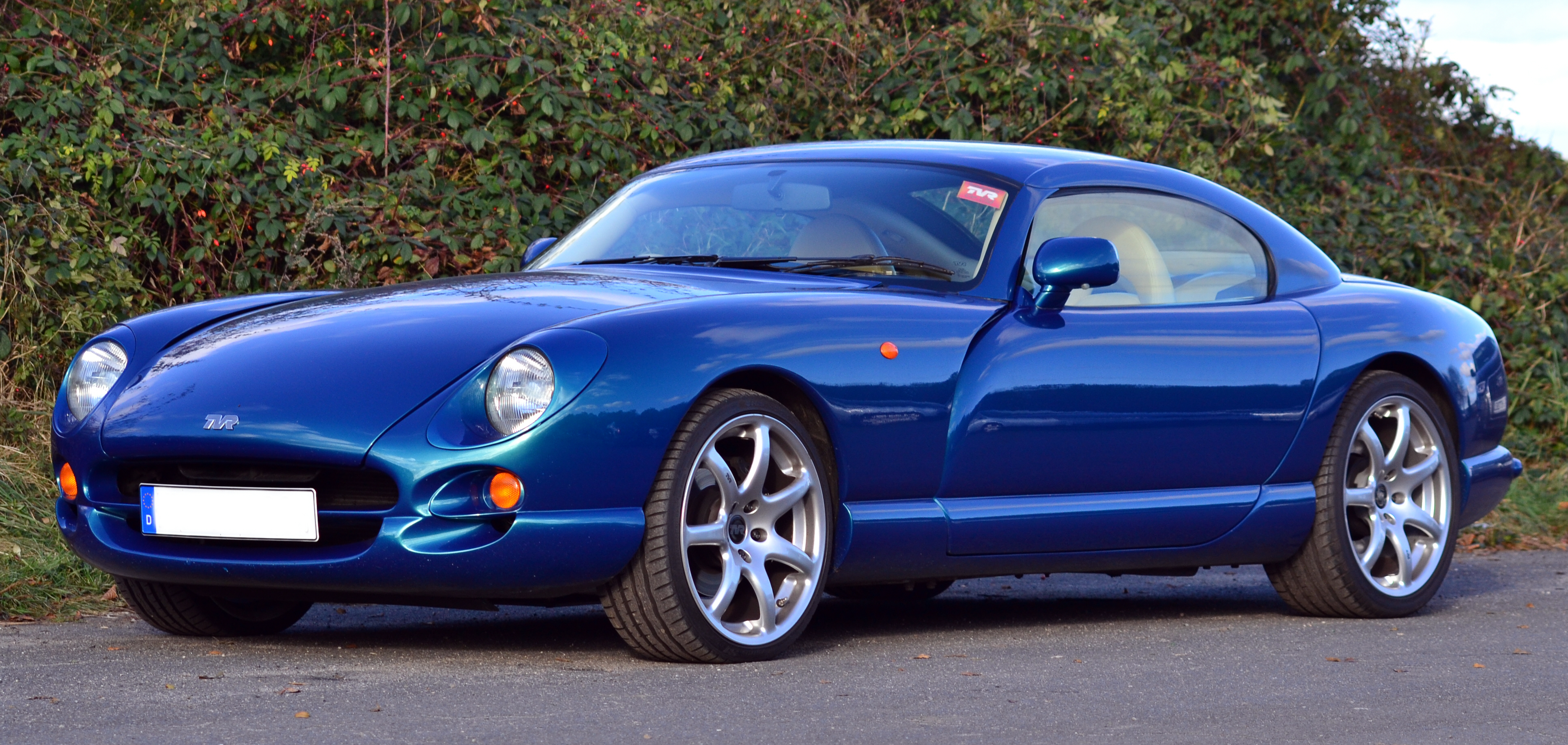 TVR Cerbera Speed Six auf dem Flugplatz Uetersen